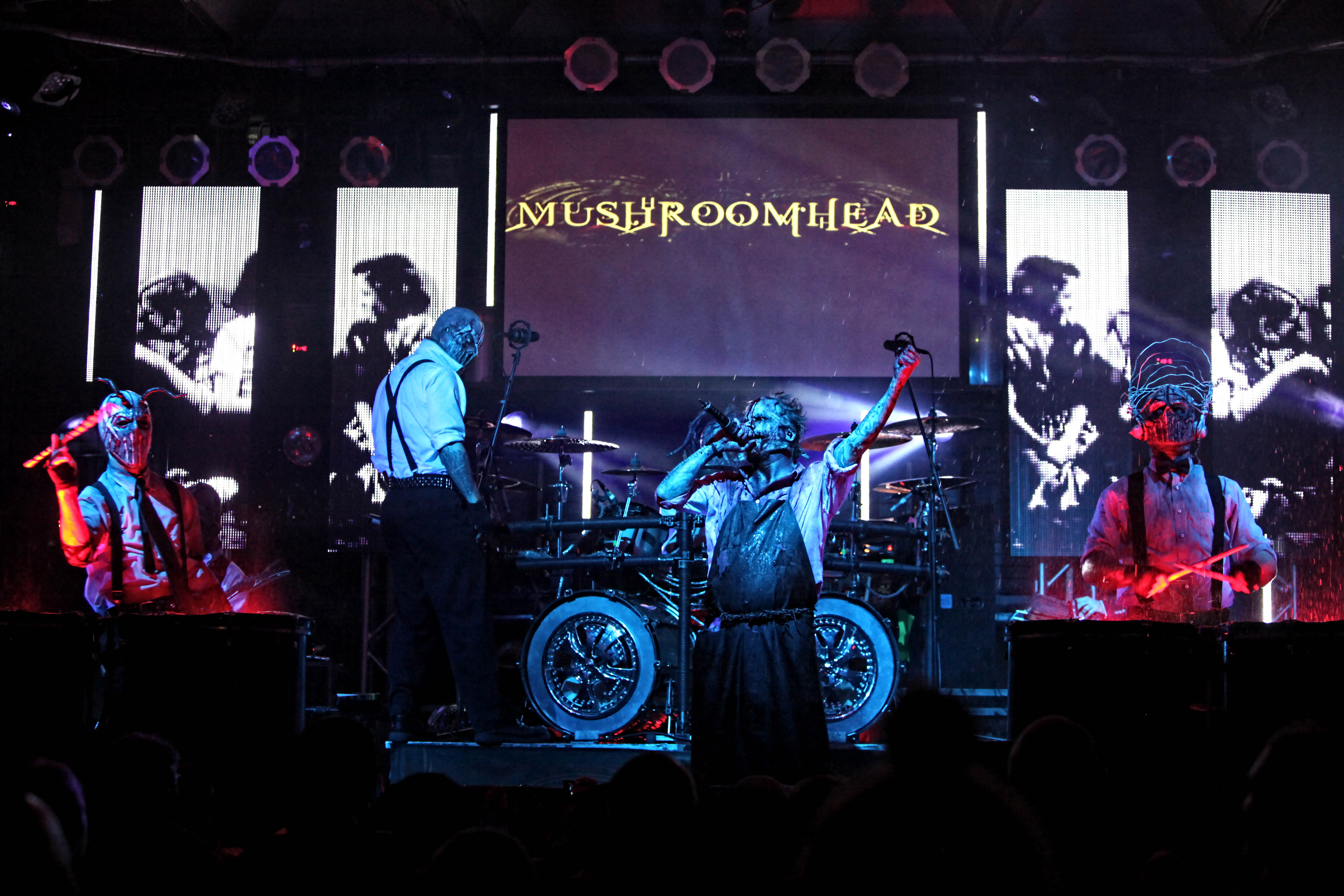 Mushroomhead en vivo en Fort Lauderdale. Fotografia tomada en el año 2011